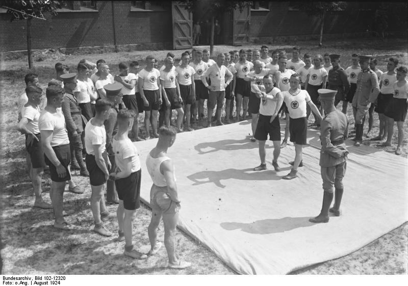 Ausbildung der preussischen Schutzpolizei in der Polizeischule in Brandenburg a/Havel. Jiu - Jitsu Unterricht der jungen Polizeianwärter auf dem Hof der Polizeischule in Brandenburg.